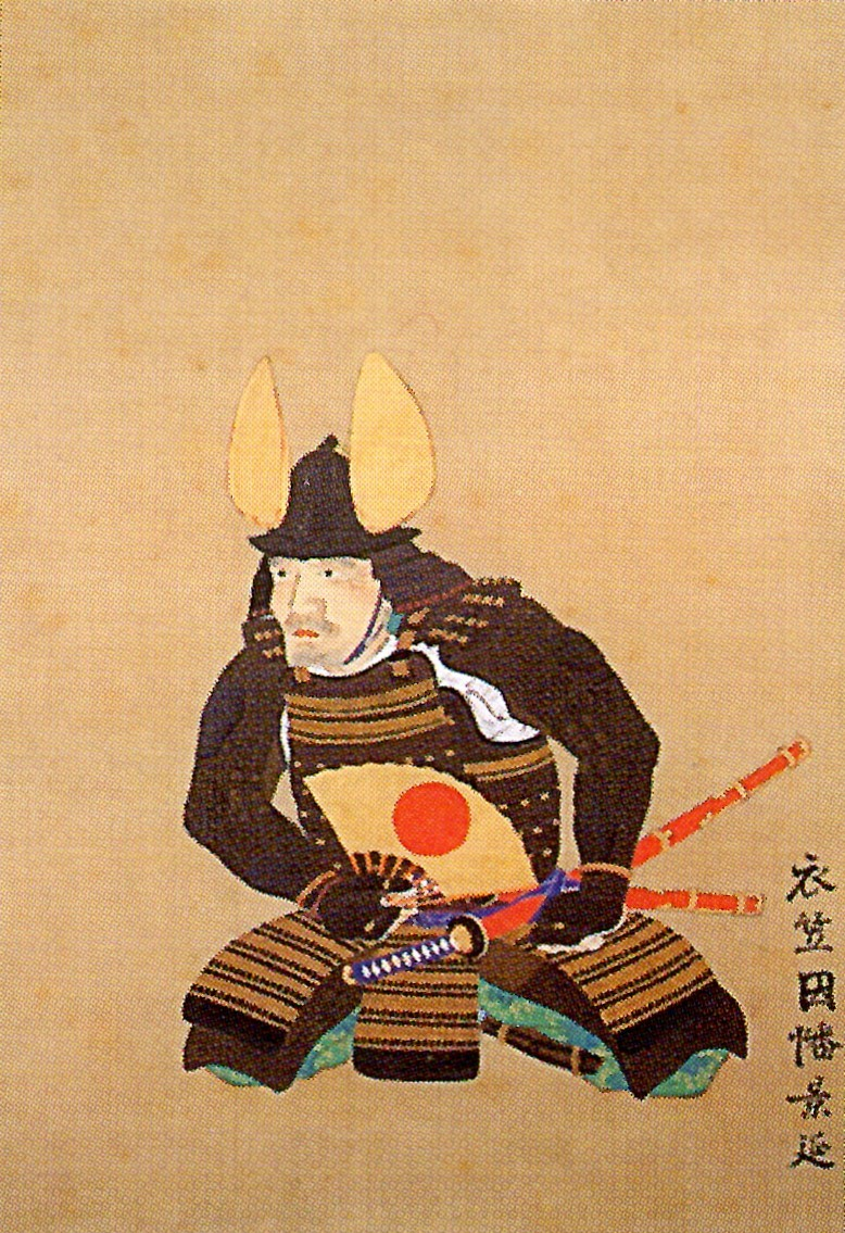 衣笠景延の肖像。